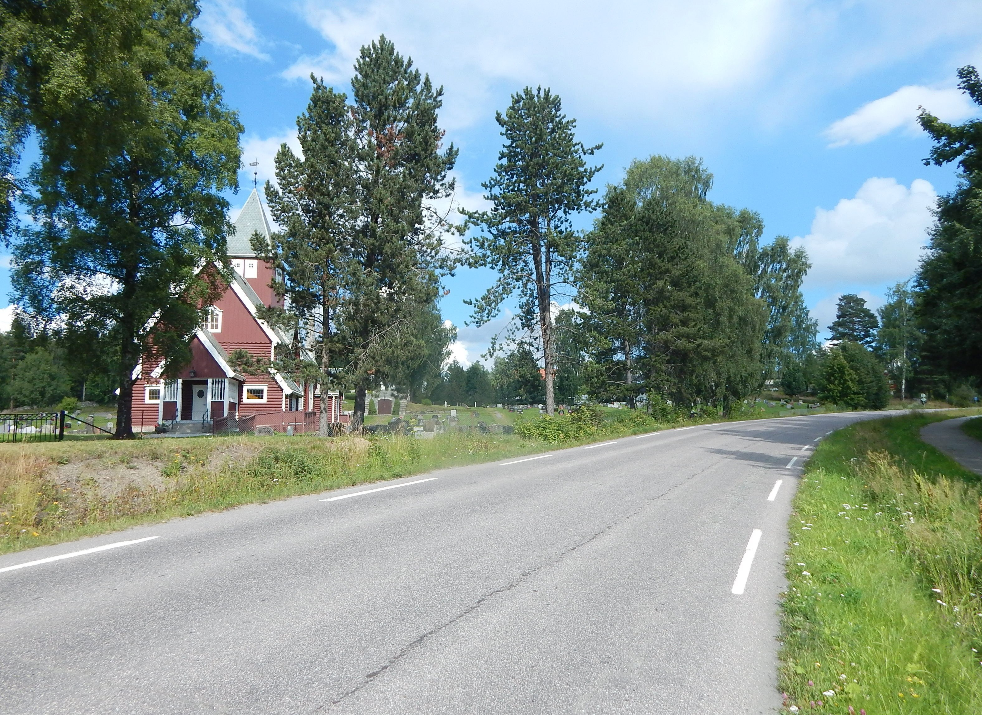 Amundrundvegen forbi Moen kirke